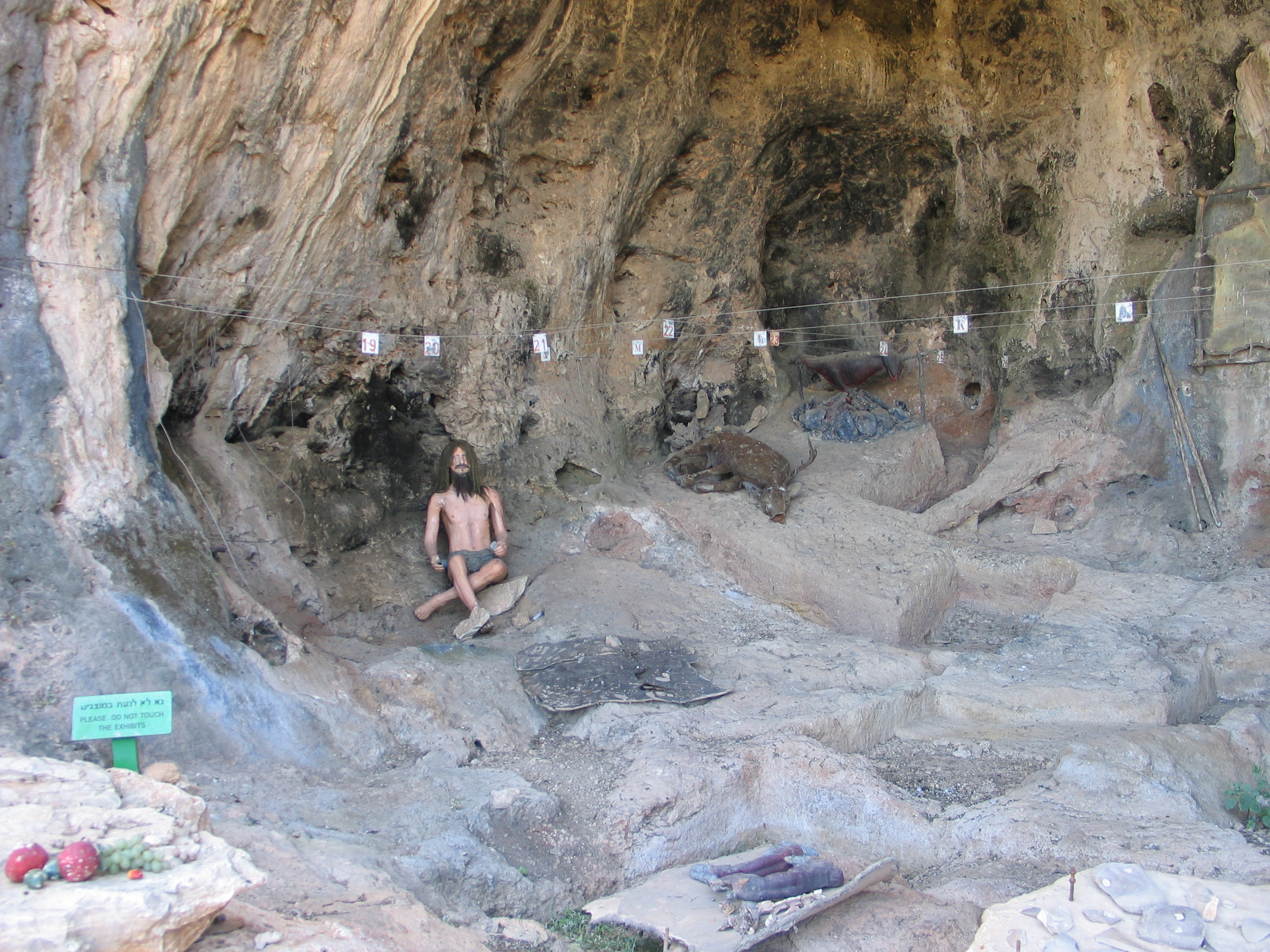 מערת האדם הקדמון